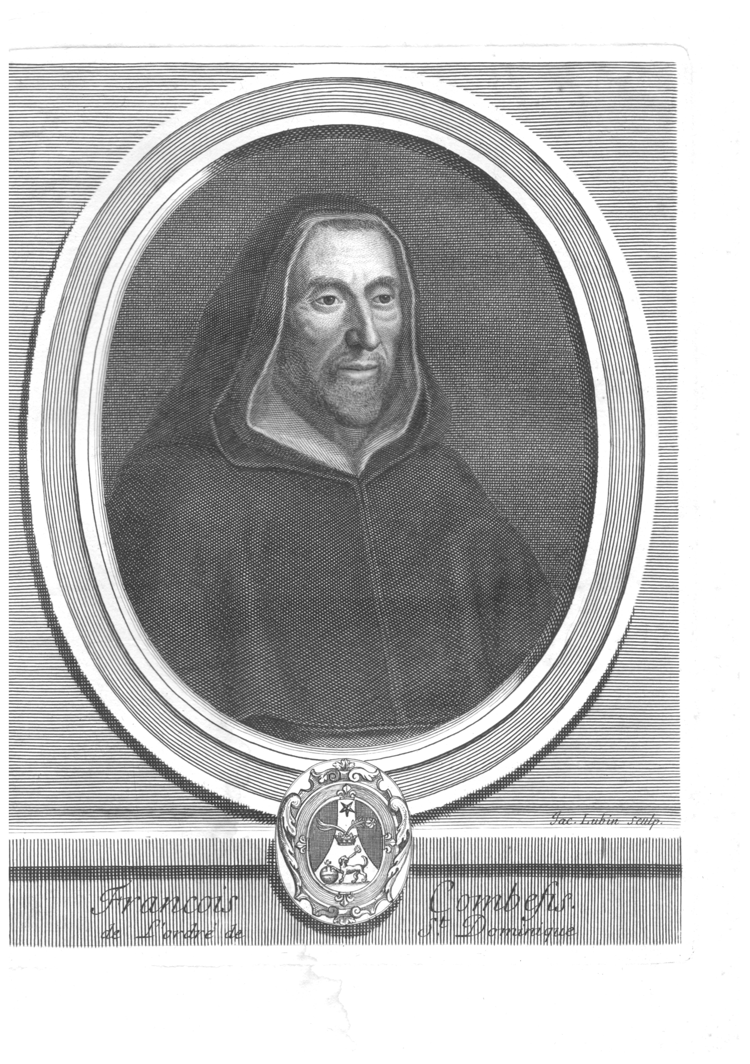 François Combefis (1605-1679), de l'ordre de saint Dominique, par Jacques Lubin